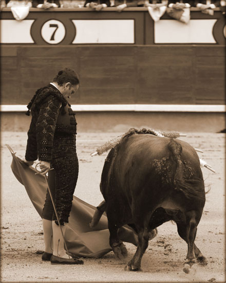 Julio Aparicio al natural en Las Ventas